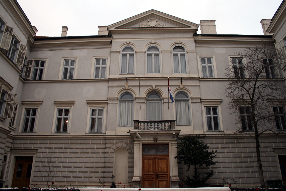 Zgrada Hrvatskog instituta za povijest u Zagrebu